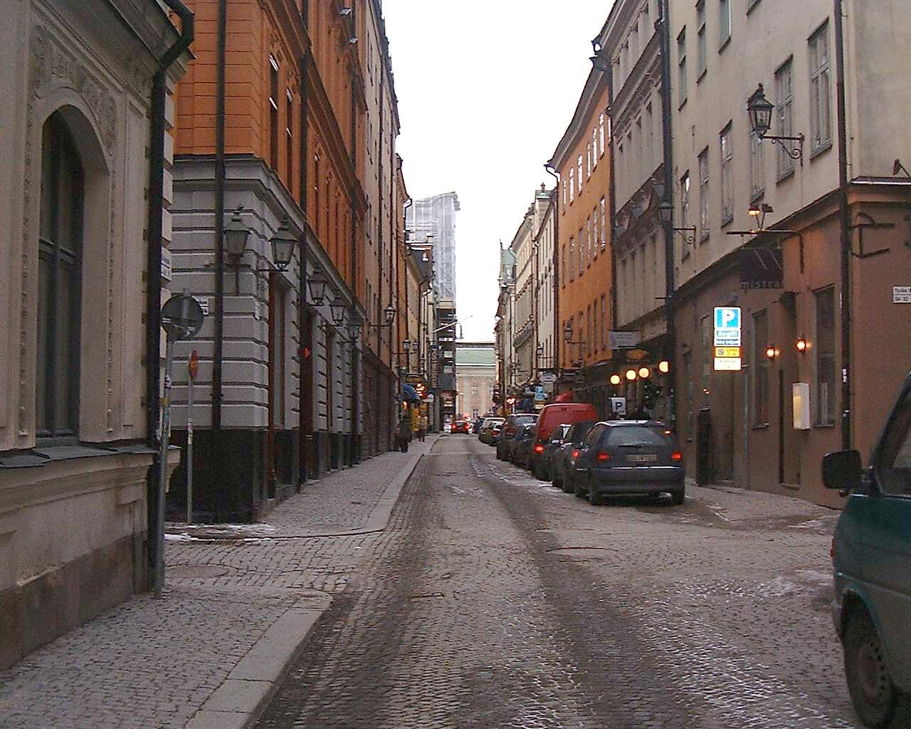 Lilla Nygatan, Stockholm, in February 2007.